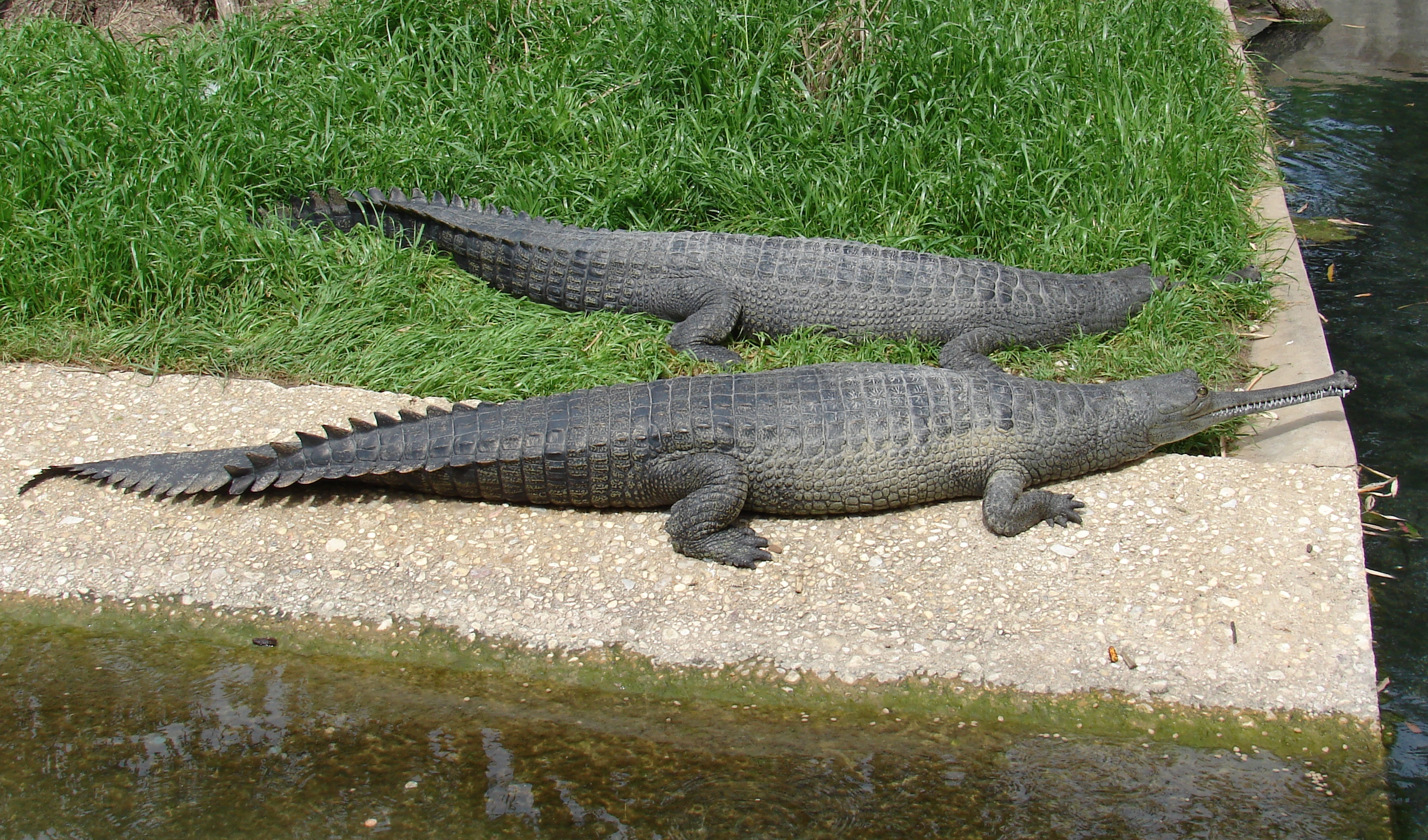 Taken at San Antonio Zoo